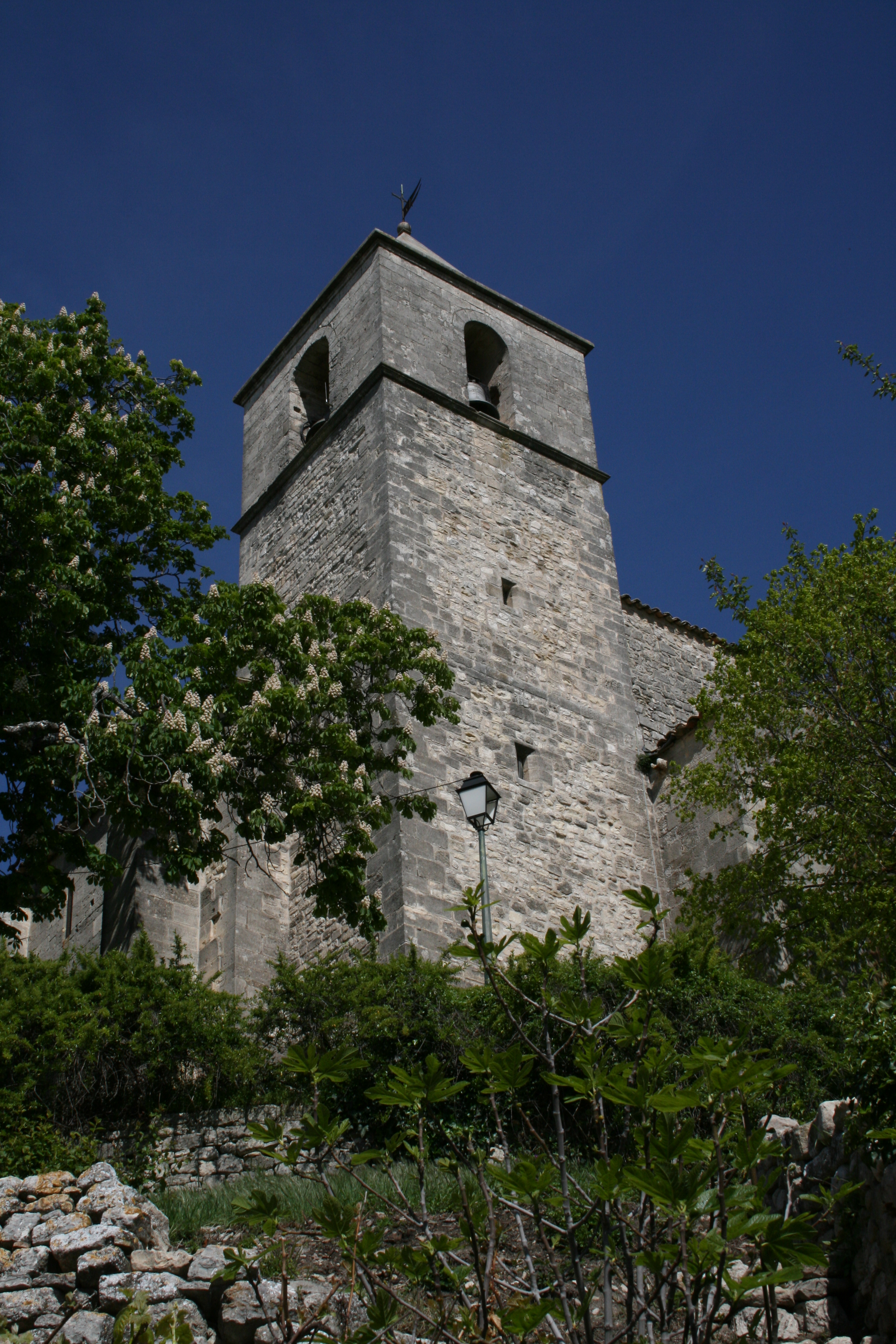 Saint-Michel l'Observatoire clocher de l'Eglise Saint-Michel